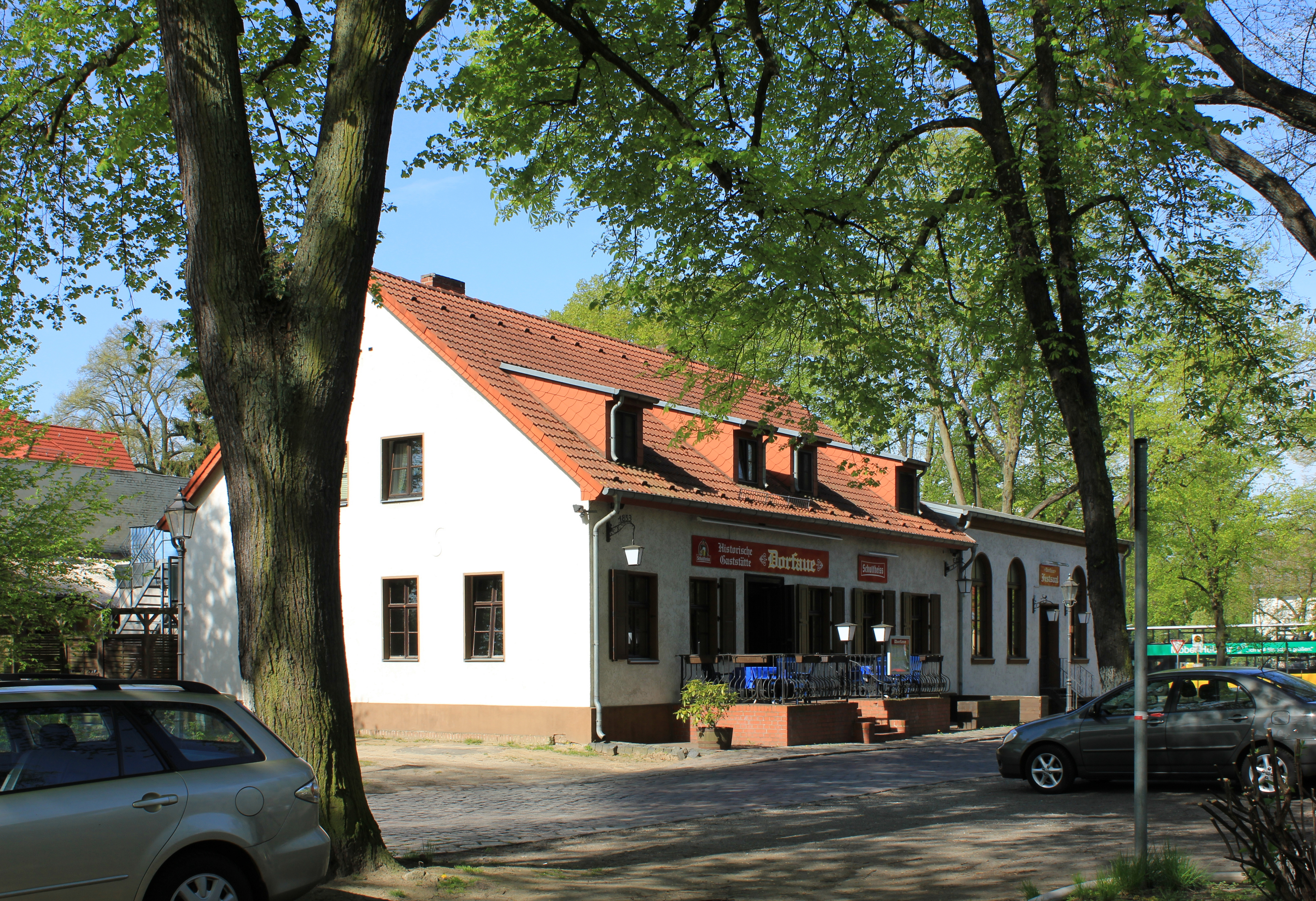 Gasthaus Zur Dorfaue Wohn- und Gasthaus, 1869 von Otto Przewisinski